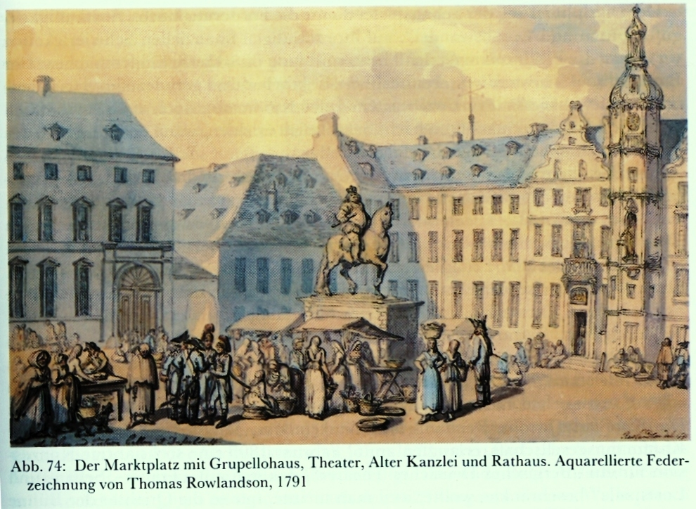 In Düsseldorf besuchte Thomas Rowlandson die Kurfürstliche Gemäldegalerie und zeichnete 1791 den Marktplatz mit dem Kurfürstlichen Komödienhaus.